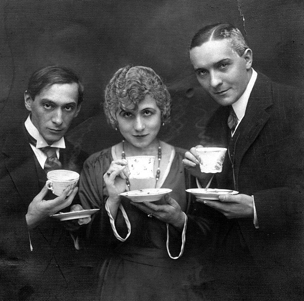 Karl Sloboda: Három csésze tea. Belvárosi Színház. Gellért Lajos (Hugó, a férj), Mészáros Giza (Lea), Petheő Attila (Ábel).